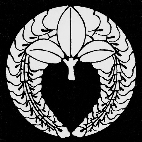 下り藤、内藤氏